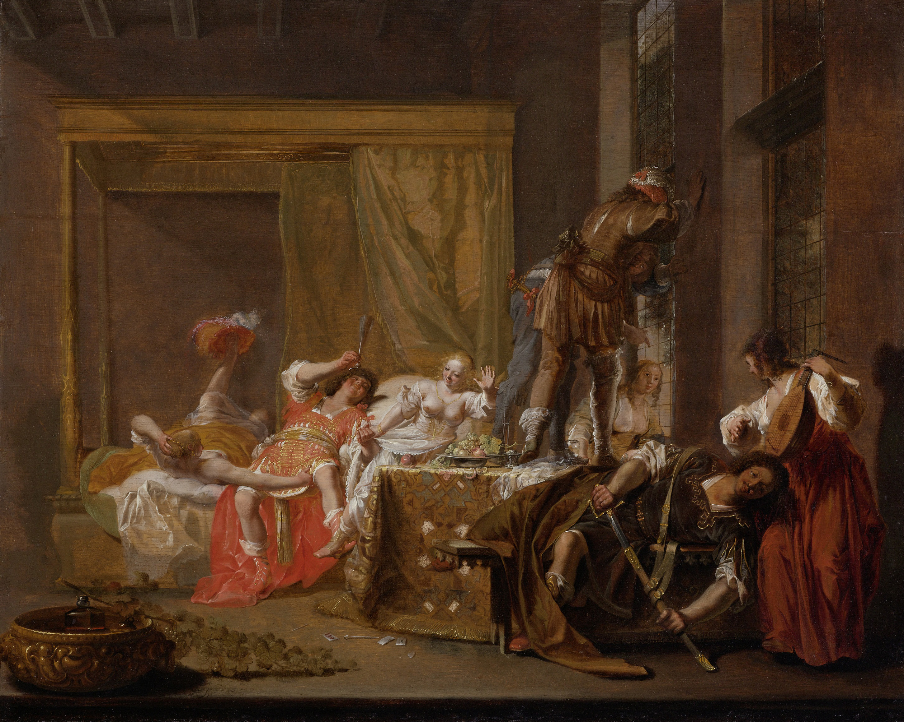 Scène uit het huwelijk van Messalina en Gaius Silius. Centrale figuren zijn Gaius Silius gekleed in militair tenue met toneellaarsjes aan en een wijnglas in zijn hand en Messalina, een mooie welgevormde jonge vrouw met ontblote borsten die Gaius vanaf een bed meesleept. Op het bed links een vrouw met een hoed op de rechtervoet die met haar rechterhand de binnenkant van Gaius dijbeen beroert.Op tafel staan twee mannen uit het venster te kijken. Een vierde man valt op de voorgrond dronken van zijn stoel terwijl hij zijn zwaard probeert te trekken. Naast hem staat een vrouw met een luit. Links op de voorgrond een grote wijnkoeler met een wijnrank.